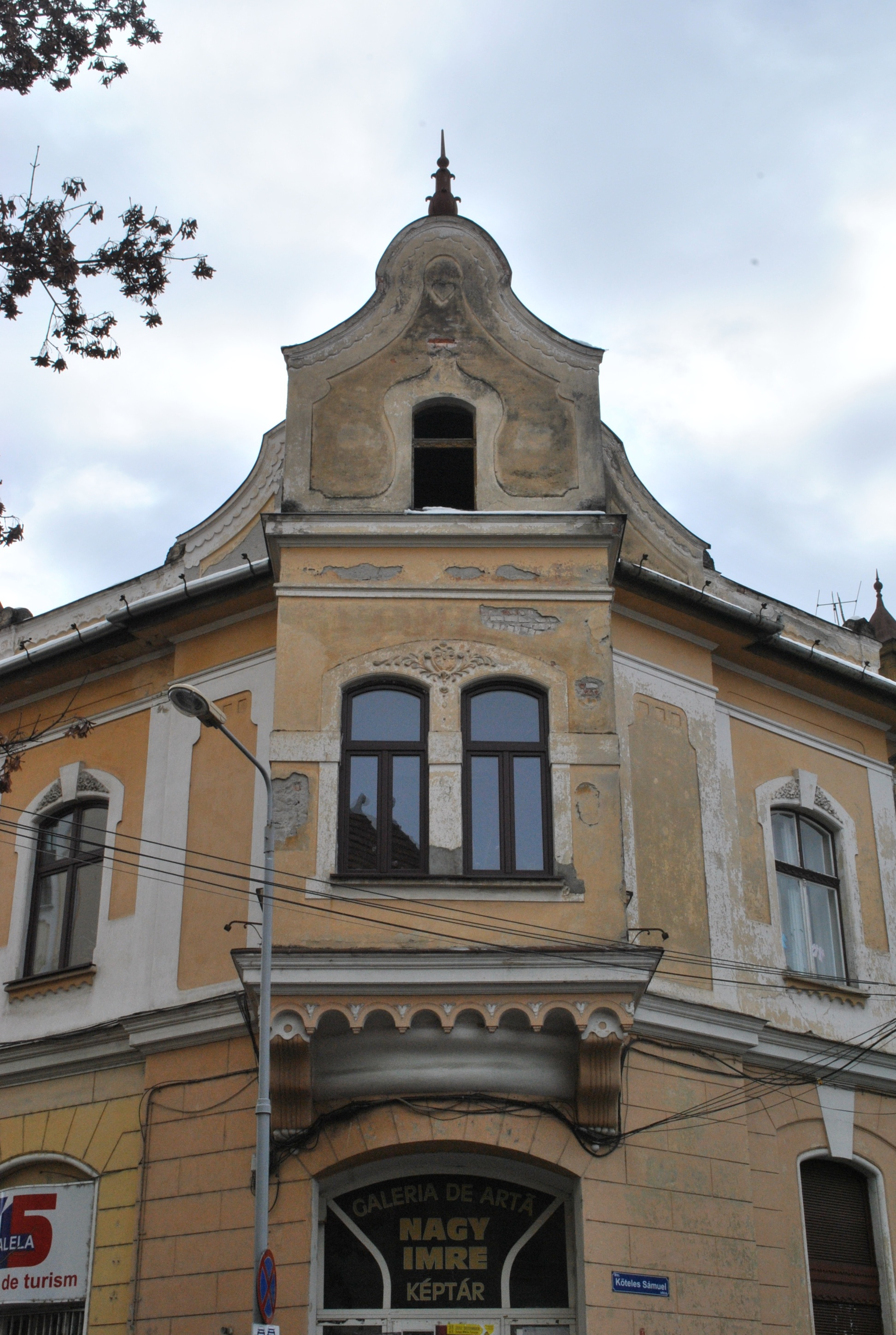 Casă, 1850 - 1900